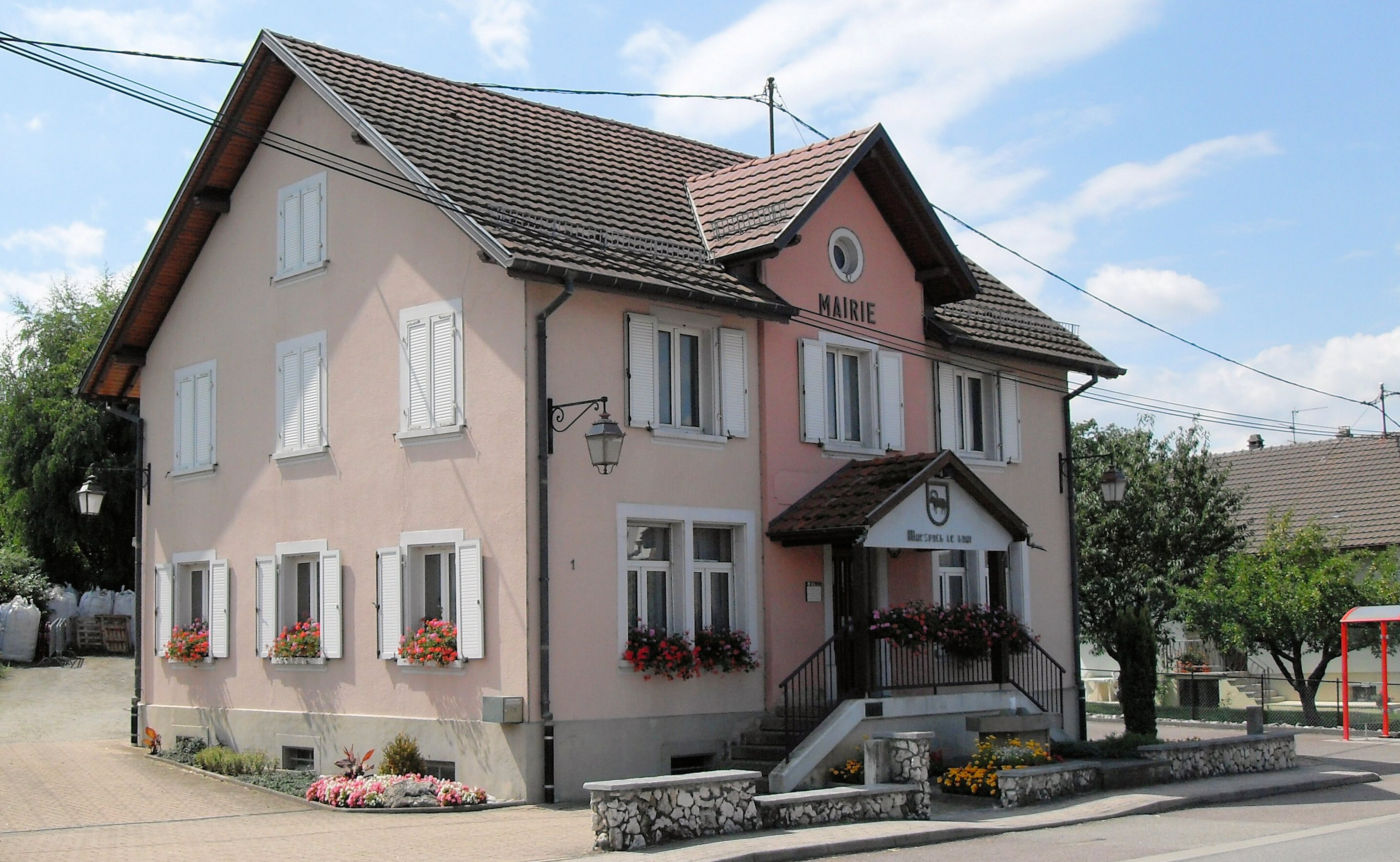 La mairie de Muespach-le-Haut